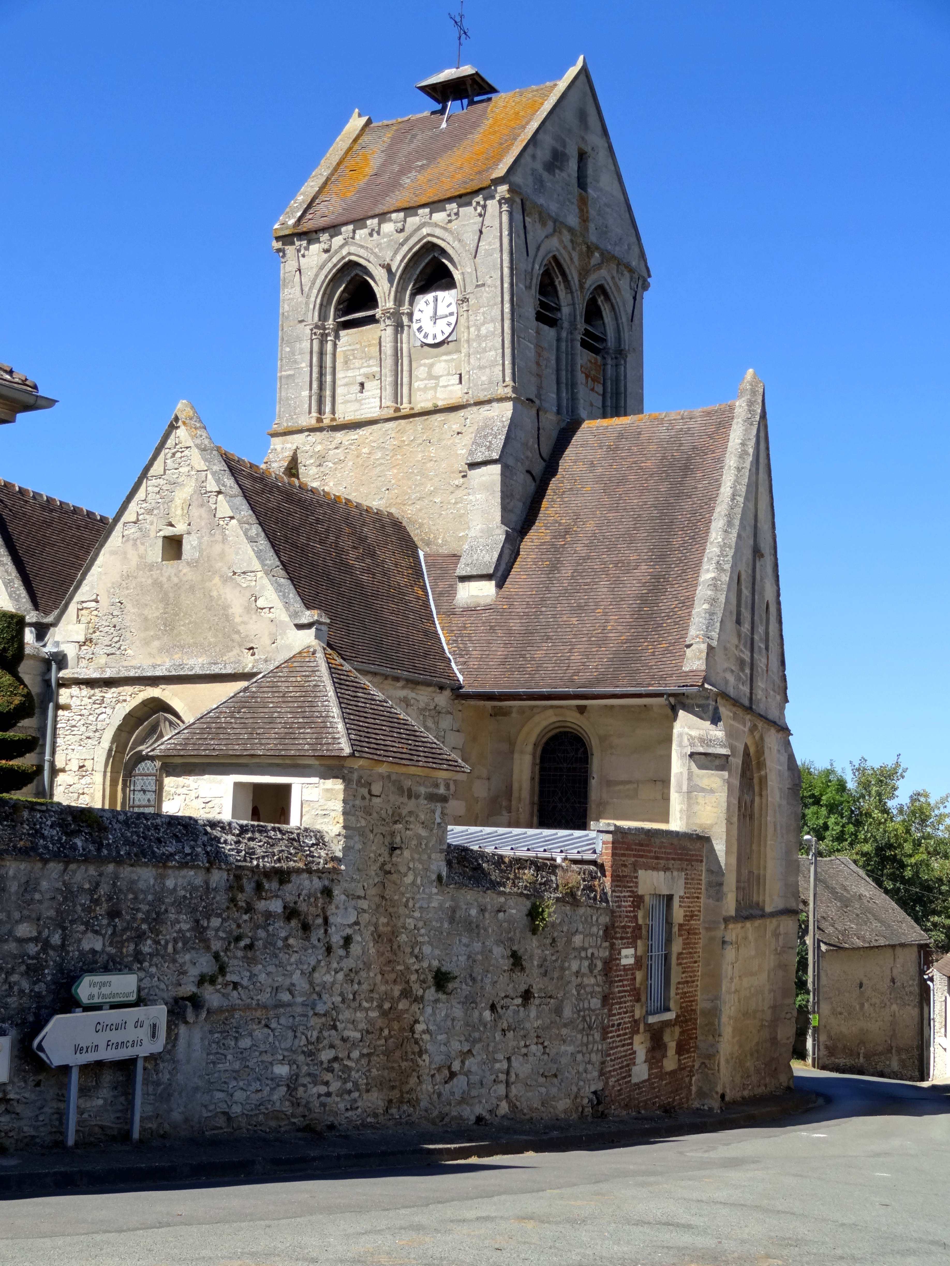 Église Saint-Gervais-et-Saint-Protais de Vaudancourt - voir titre.